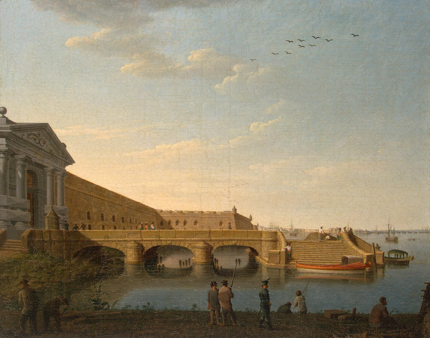 Neva gate of Peter and Paul Fortresslabel QS:Len,"Neva gate of Peter and Paul Fortress"label QS:Lru,"Невские ворота Петропавловской крепости"